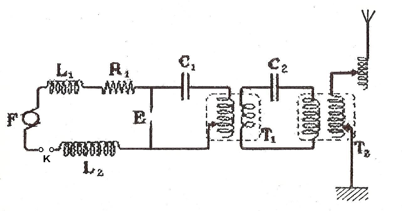 Émetteur radiotélégraphique et radiotéléphonnique à arc.